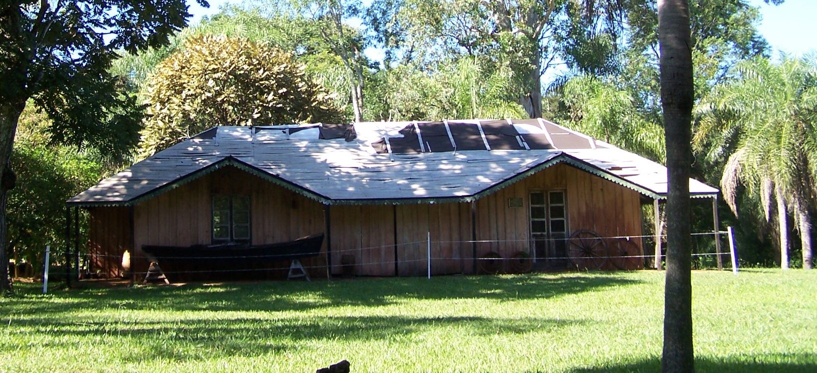 Reconstrucción de la primera casa de Horacio Quiroga (quemada por los nativos) para el rodaje de una película.